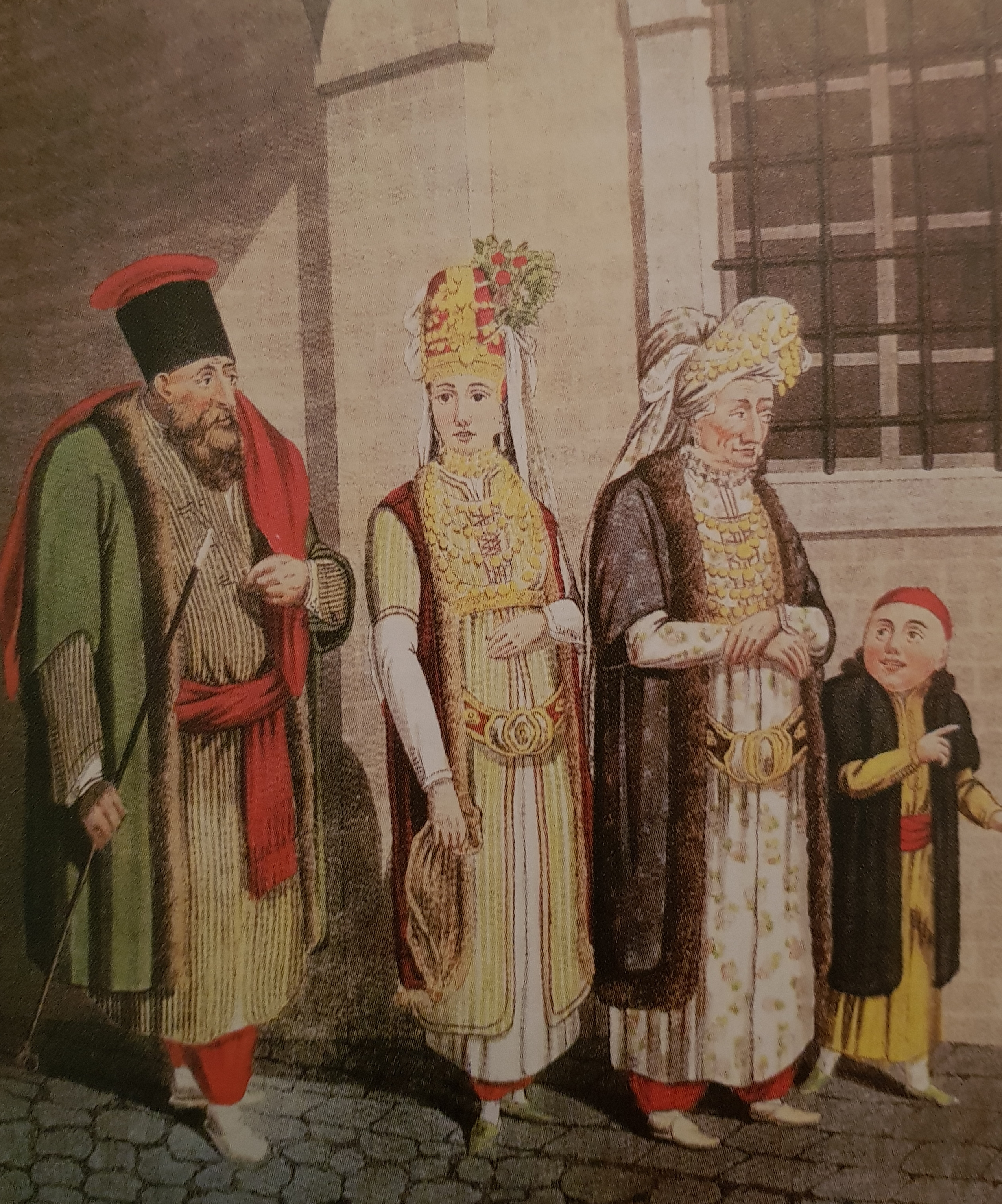 Kolorieter Aquatintstrich eines türkischen Juden mit seiner Familie in Wien um 1815